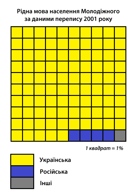 Інфографіка розподілу населення смт Молодіжне Долинського району за рідною мовою згідно з даними перепису 2001 року. Джерело: Розподіл населення Кіровоградської області за рідною мовою (у % до загальної чисельності населення) за переписом 2001 року